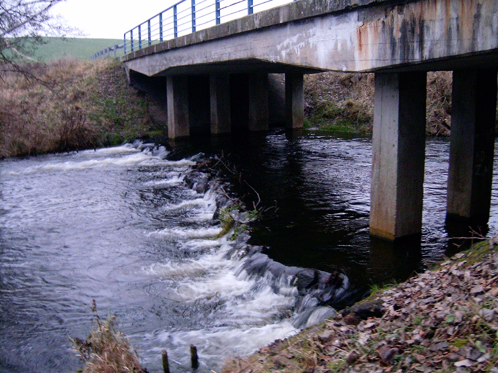 Most w Bielikowie na rzeczce Mołstowie. Author Frugo, on polish wikipedia Pablito.